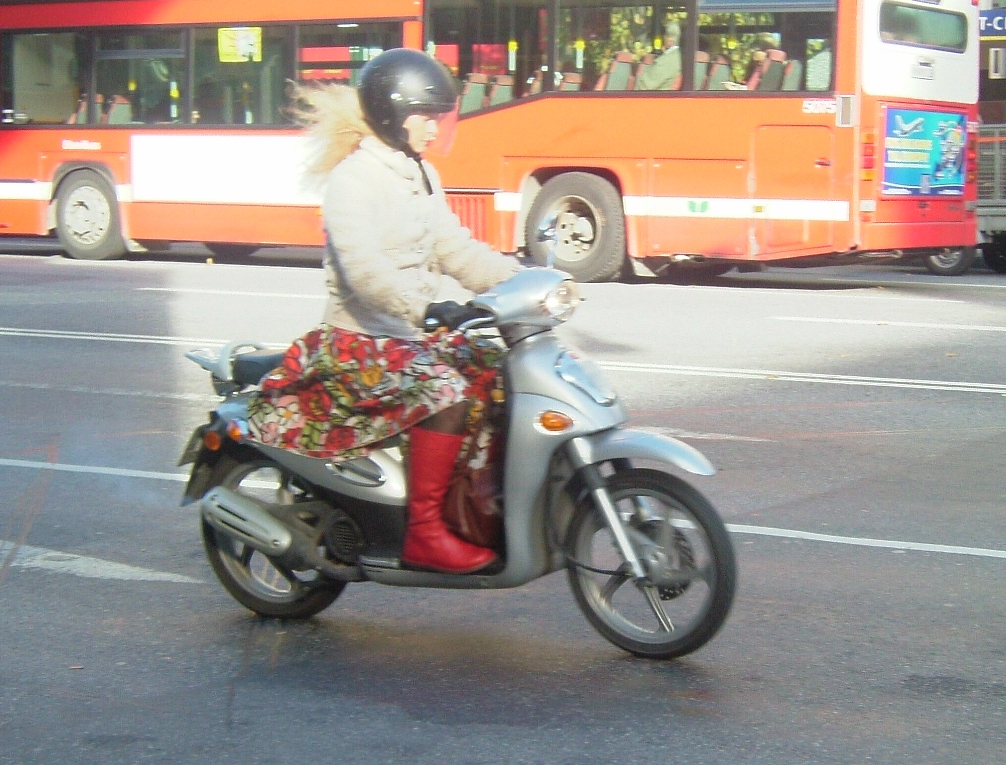 Lena Endre på EU-moppe i Stockholmstrafiken